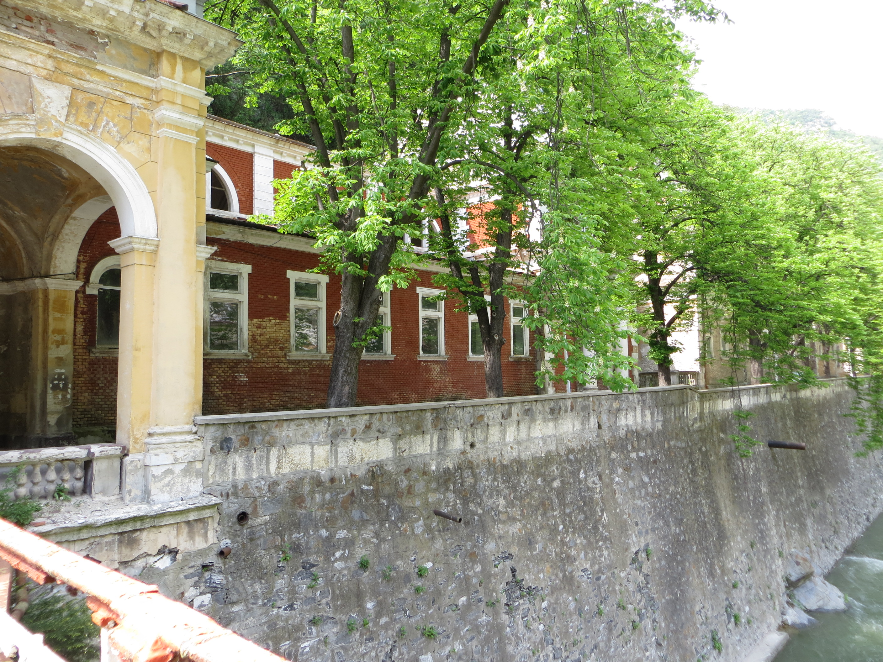 Îndiguire râu Cerna